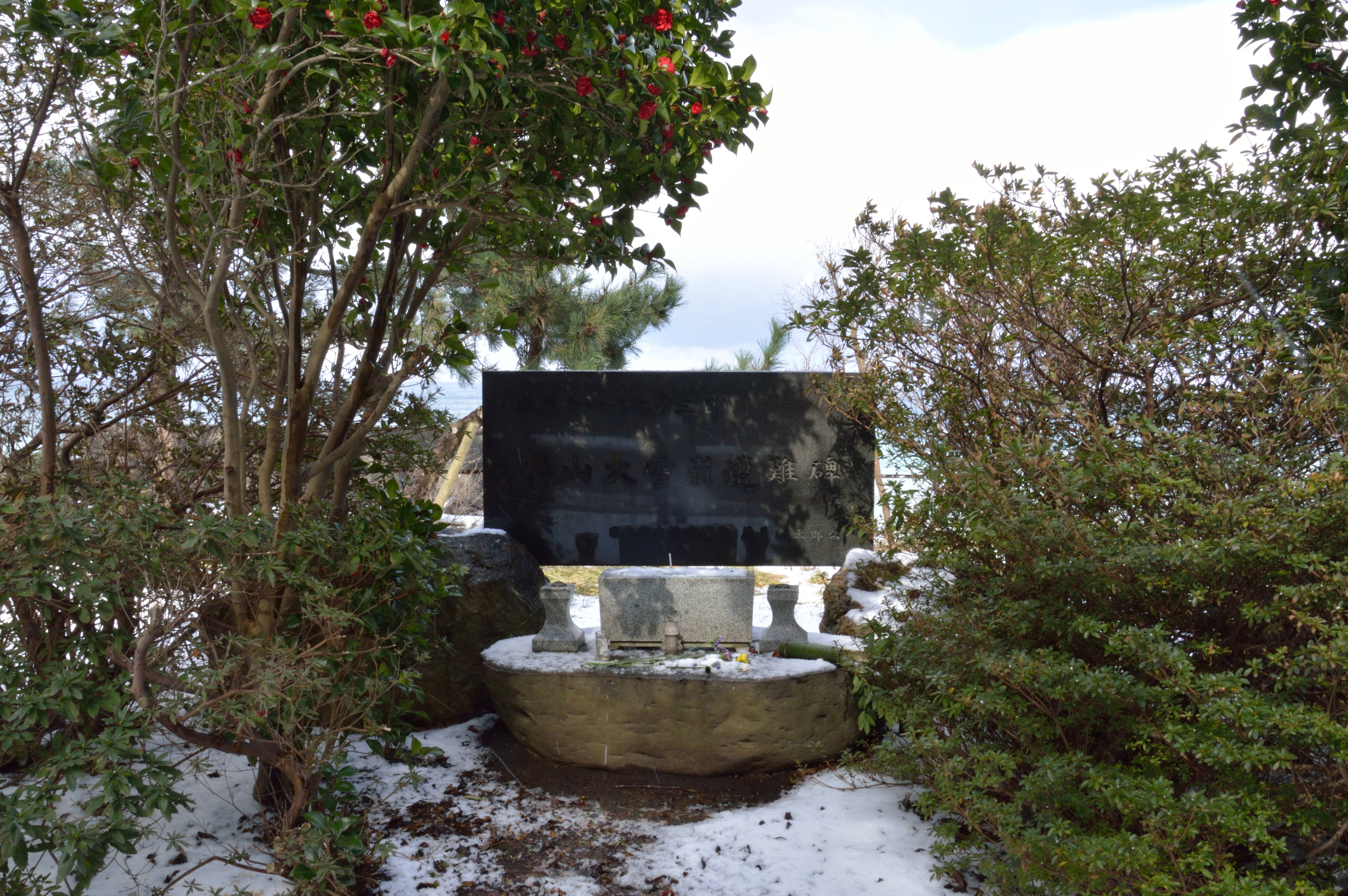 「勝山大雪崩遭難碑」」。北陸線列車雪崩直撃事故の慰霊碑であり、現在のものは1974年設置の2代目。（新潟県糸魚川市勝山 2017年2月11日撮影）